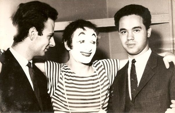 Gianni Lunadei junto a Marcel Marceau, en el Teatro Nacional Cervantes, ca. 1964.